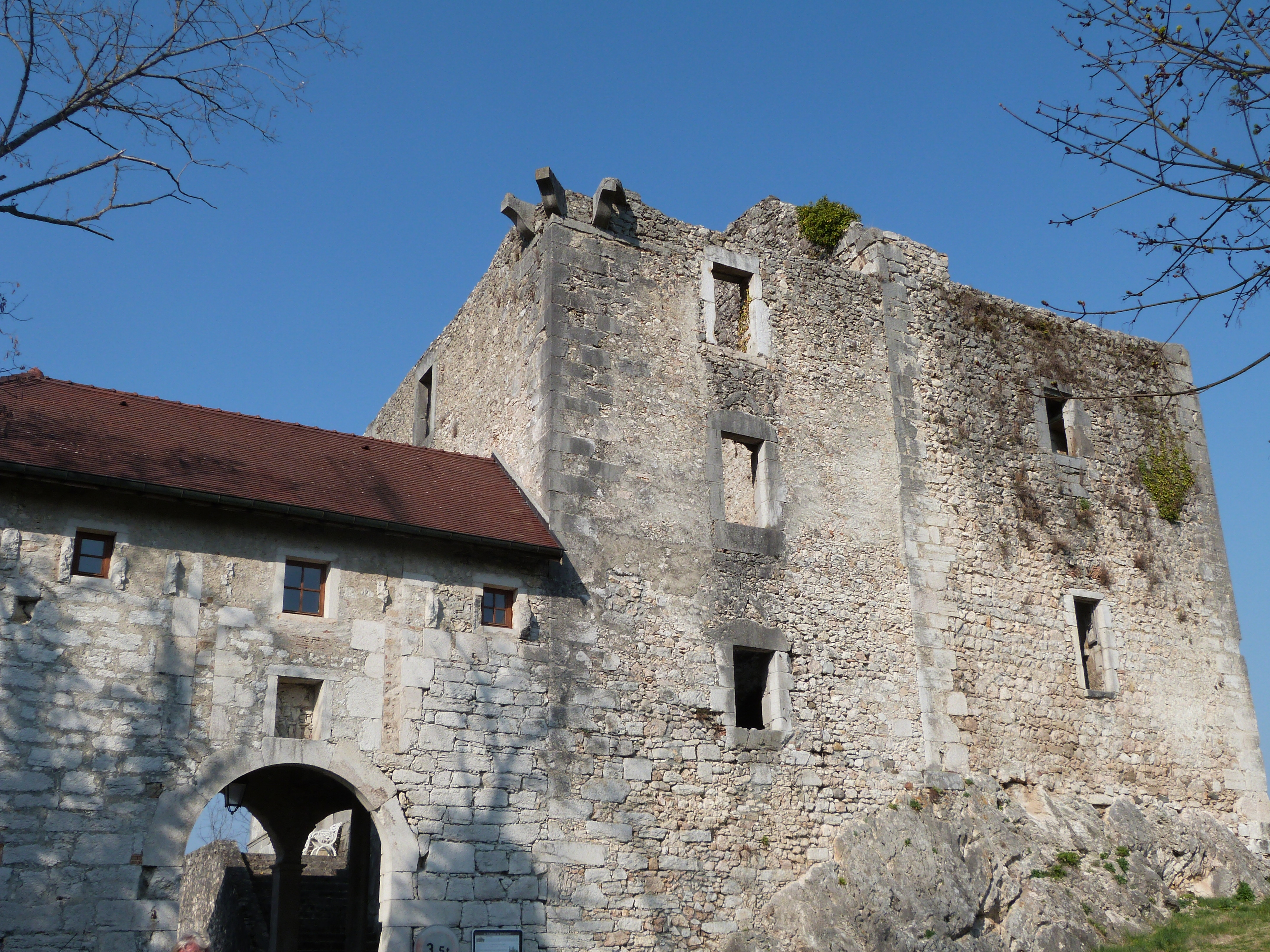 Chateau de Rochefort sur Séran - 1